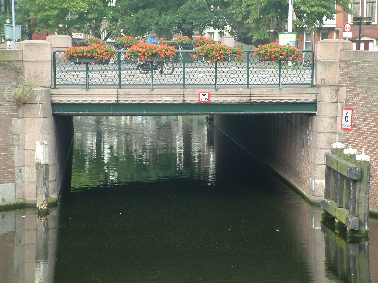 Brug in Den Haag